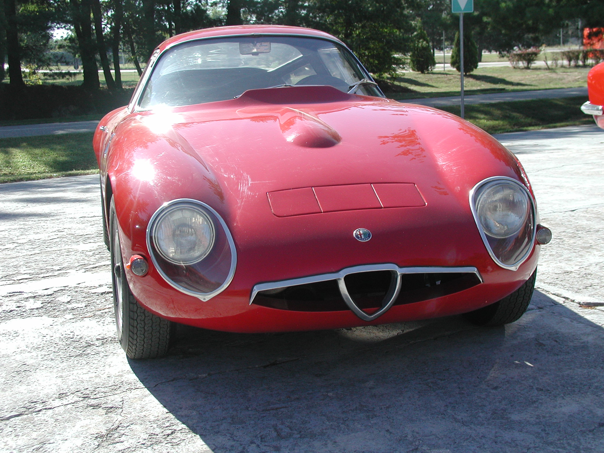 Alfa Romeo Giulia TZ1